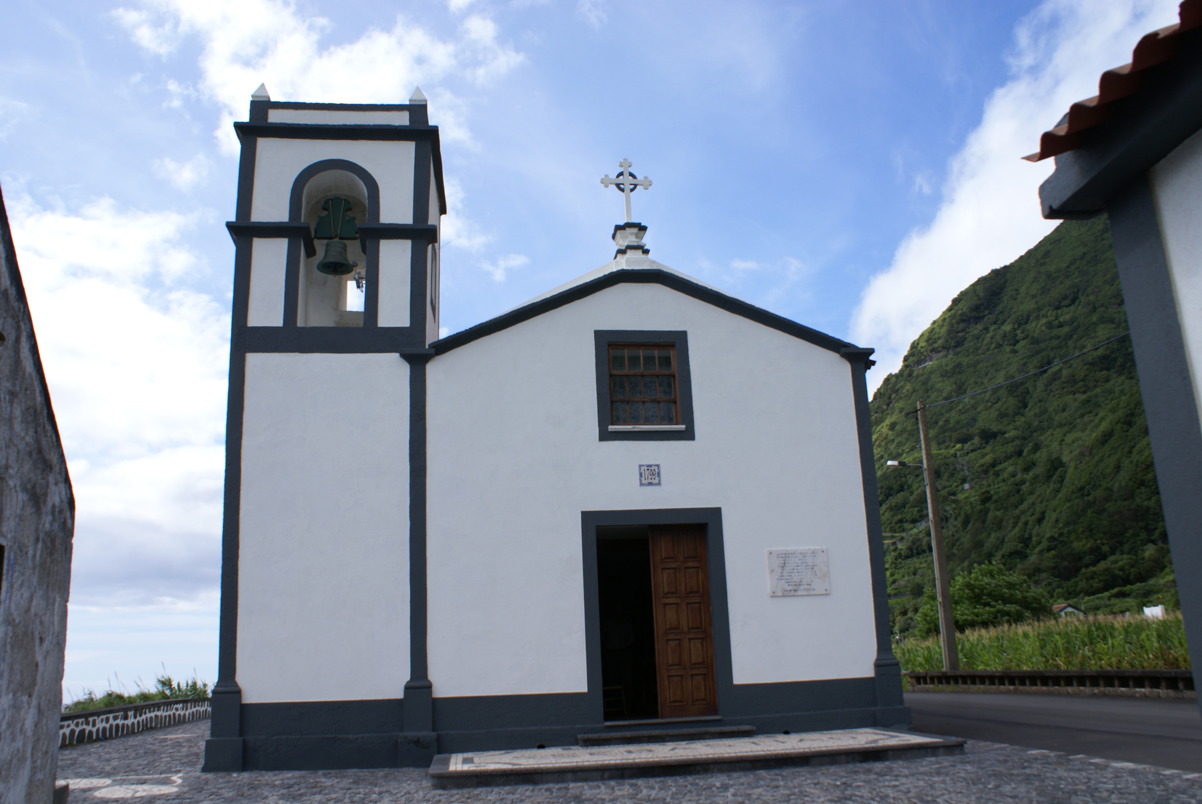 Capela de São Sebastião, Fajã dos Vimes, exterior, Calheta, ilha de São Jorge, Açores